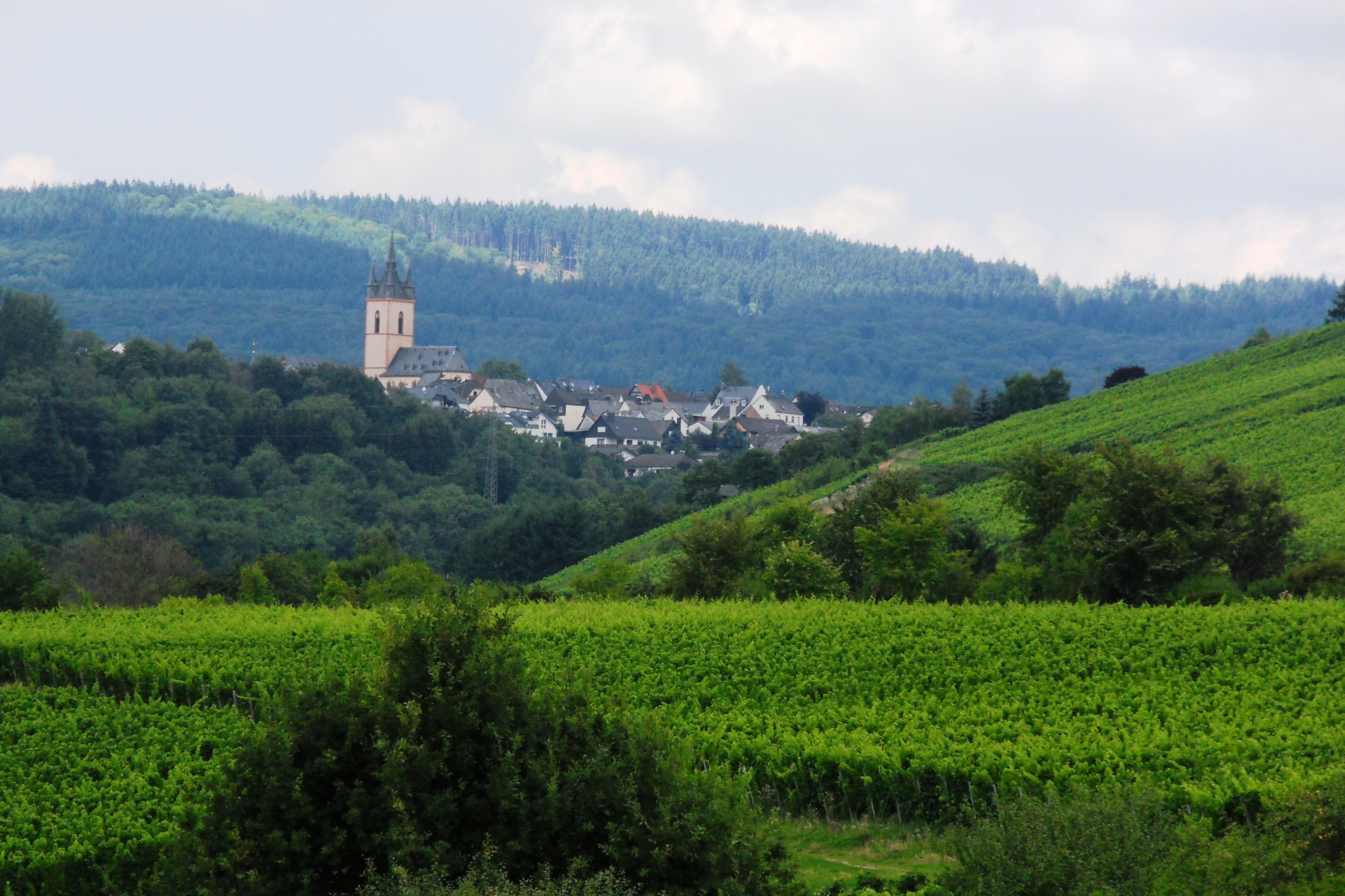 Blick von der Walluftalbrücke der Bundesstraße 42 über die Weinberge von Martinsthal nach Rauenthal; dahinter links die 548 m hohen bewaldeten Dreibornsköpfe und in der Mitte der 495 m hohe Hansenkopf auf der Grenze von Rauenthal zum dahinter liegenden Schlangenbad. Beide Berge gehören zum Taunushauptkamm.